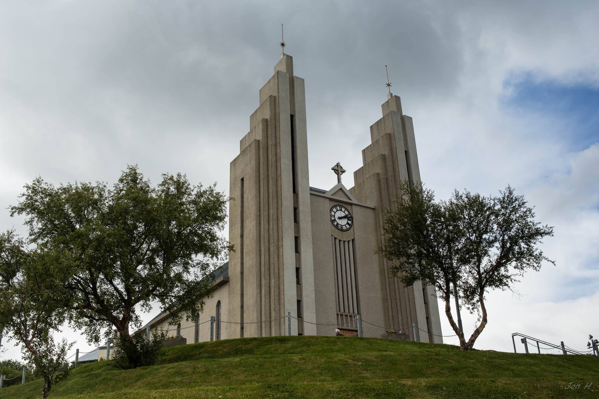 Akureyrarkirkja